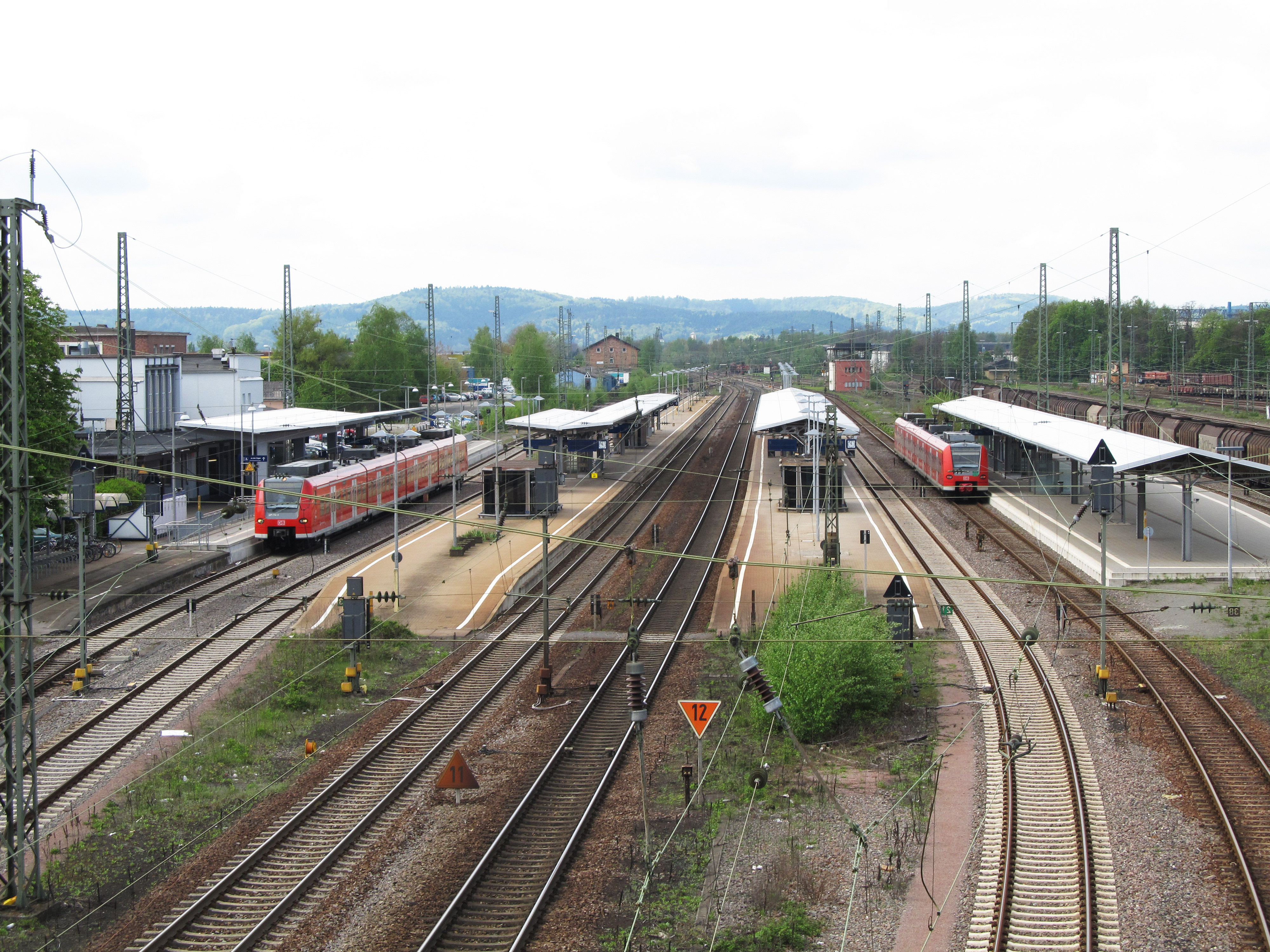 Blick über die Gleise des Homburger Hauptbahnhofs, links das Bahnhofsgebäude